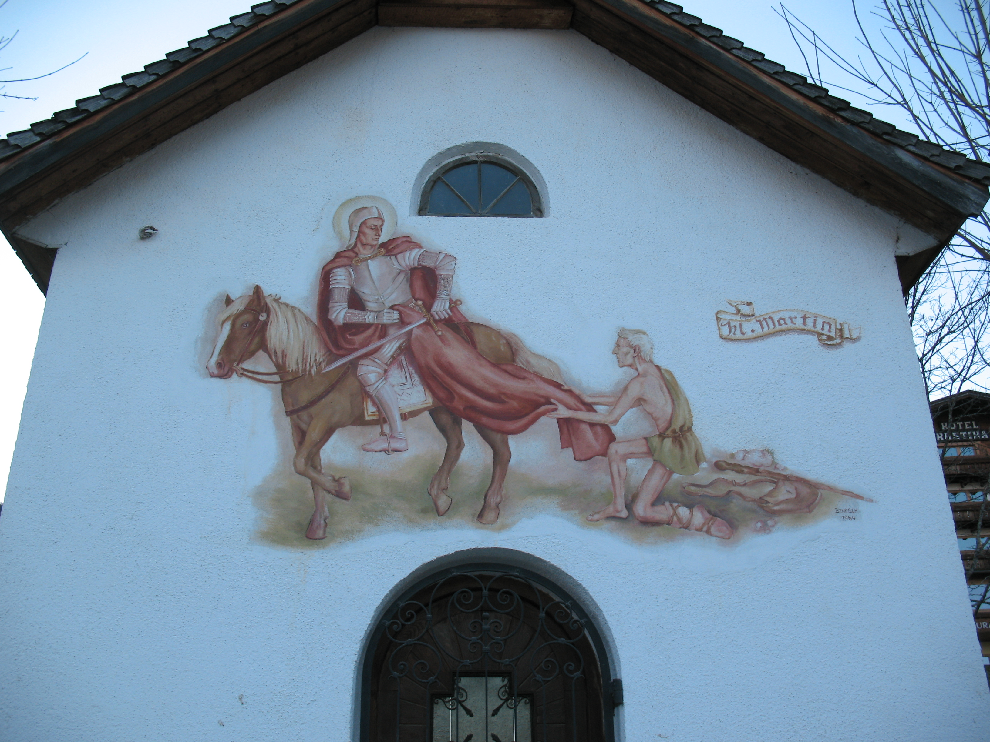 Ortskapelle hl. Martin: Wandgemälde hl. Martin mit dem Bettler von Rosa Benesch-Hennig (1964) This media shows the remarkable cultural object in the Austrian state of Tyrol listed by the Tyrolean Art Cadastre with the ID 24667. (on tirisMaps, pdf, more images on Commons, Wikidata)